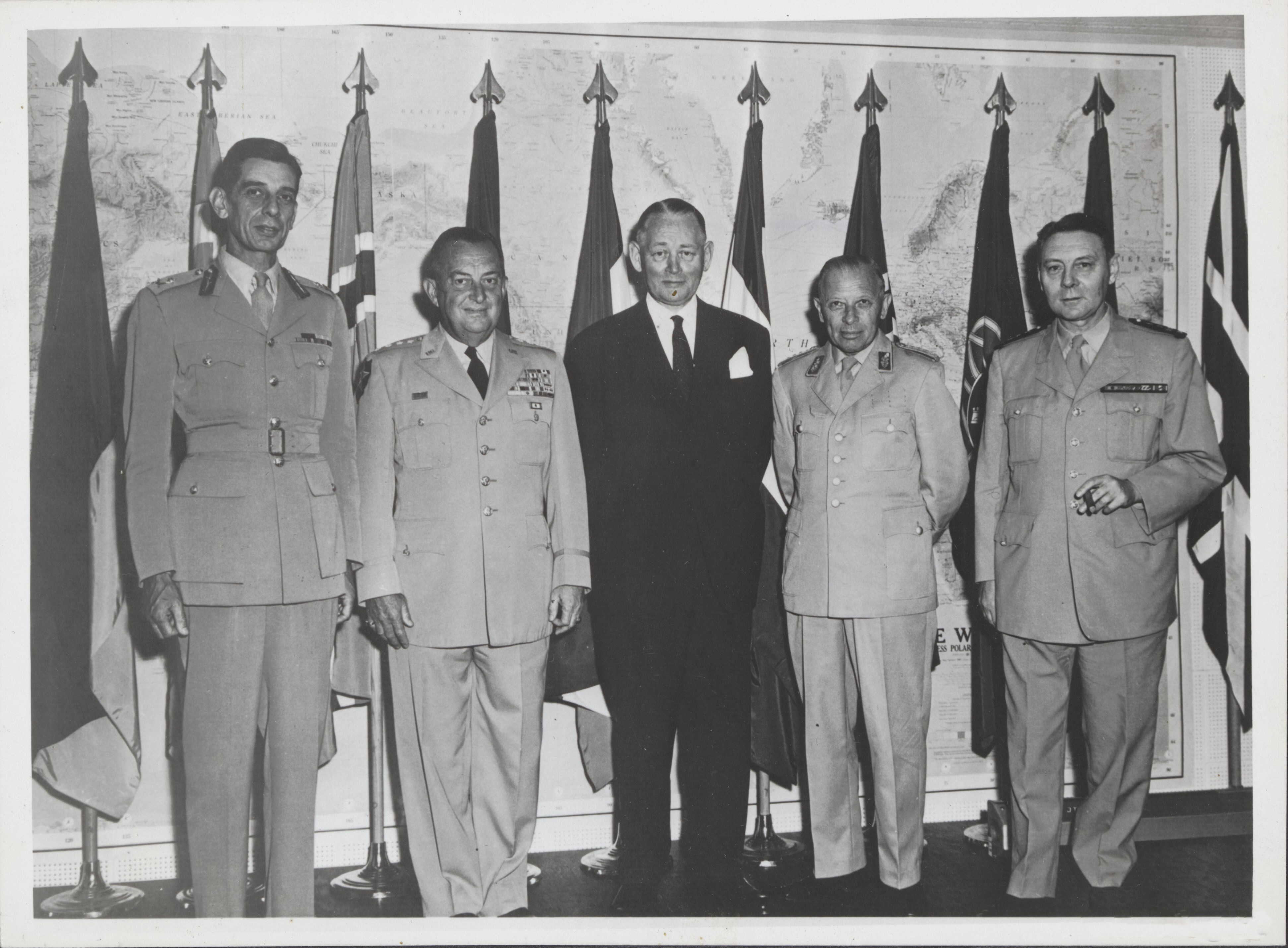 Collectie / Archief : Fotocollectie Elsevier Reportage / Serie : [ onbekend ] Beschrijving : Left to right: XXX, YYY, André Beaufre, Adolf Heusinger, ZZZ. Nato, vertegenwoordigers, Beaufre, Heusinger, Washington, Amerika Datum : 24 november 1964 Locatie : Amerika, Washington Trefwoorden : nato, vertegenwoordigers Persoonsnaam : Beaufre, Heusinger Fotograaf : Nijs, Jac. de / Anefo Auteursrechthebbende : Nationaal Archief Materiaalsoort : Foto (zwart/wit) Nummer archiefinventaris : bekijk toegang 2.24.05.02 Bestanddeelnummer : 093-1264